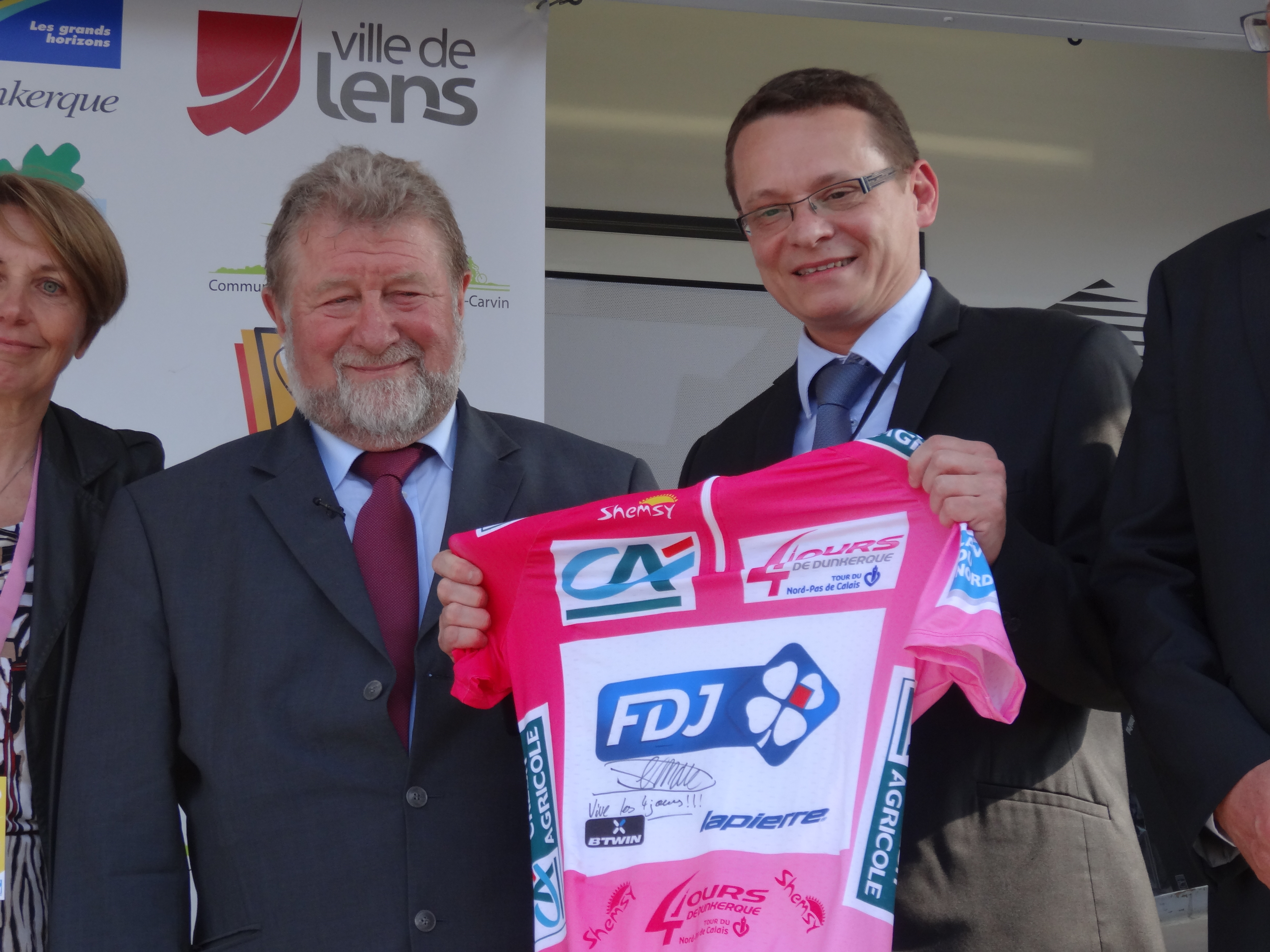 Reportage photographique réalisé le vendredi 3 mai 2013 à l'arrivée de la troisième étape de l'édition 2013 des Quatre jours de Dunkerque à Liévin, Pas-de-Calais, Nord-Pas-de-Calais, France, dans le bassin minier du Nord-Pas-de-Calais. Ce fichier représente un ou plusieurs coureurs cyclistes que JÄNNICK Jérémy n'est pas parvenu à identifier, ou n'a pas eu le temps de le faire. Si vous le reconnaissez, supprimez Quatre jours de Dunkerque 2013|Cycliste non identifié et remplacez le par Depicted person|1= :Category: | et placez Category: , Quatre jours de Dunkerque 2013 en bas de page. Si vous souhaitez qu'un portrait soit généré à partir de cette image, contactez son auteur qui s'en chargera, afin que ce nouveau fichier soit cohérent avec les autres réalisés. Des notes peuvent être utiles pour identifier précisément chaque personne.